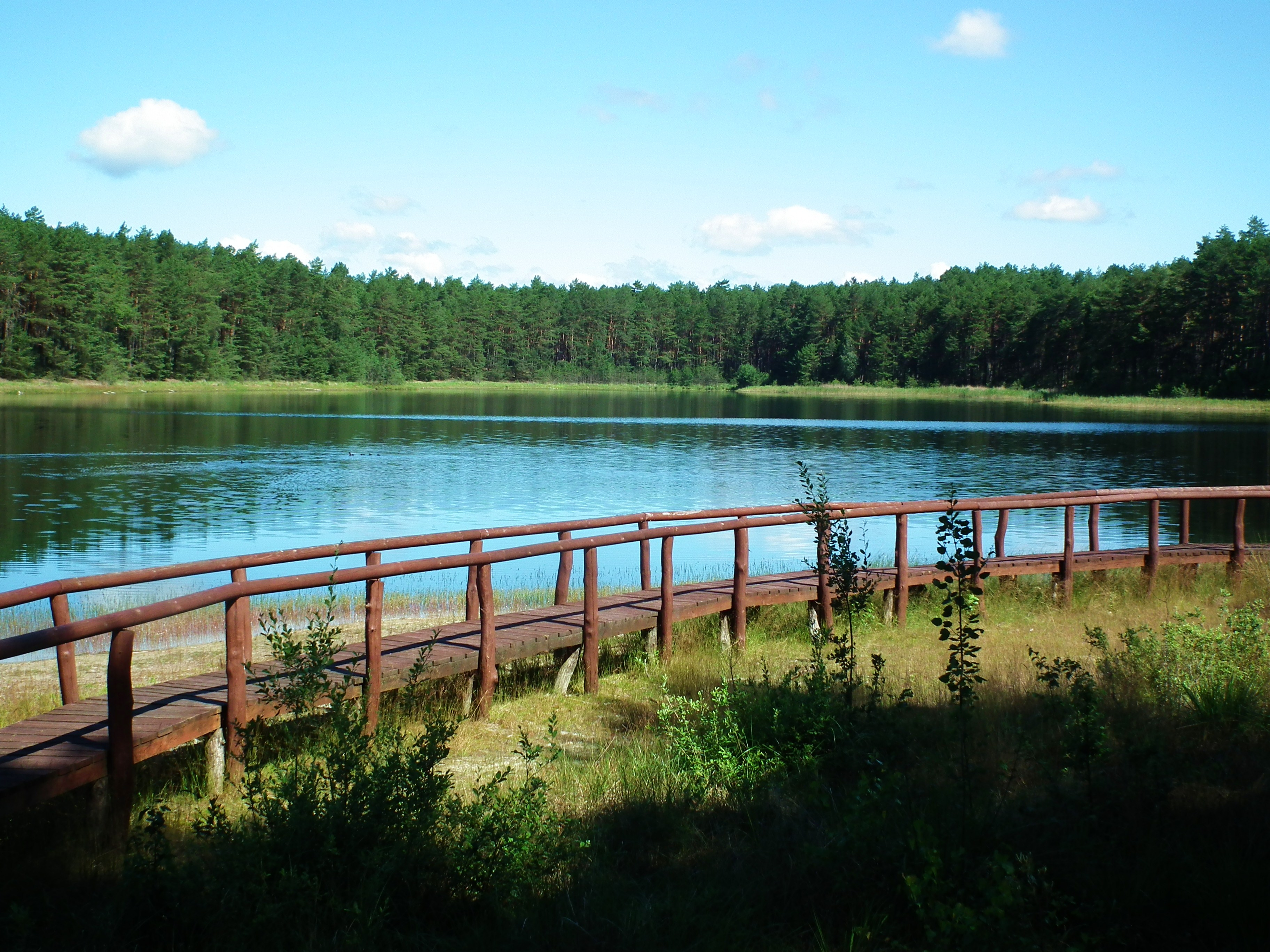 Jezioro Wielkie Gacno - Bory Tucholskie.